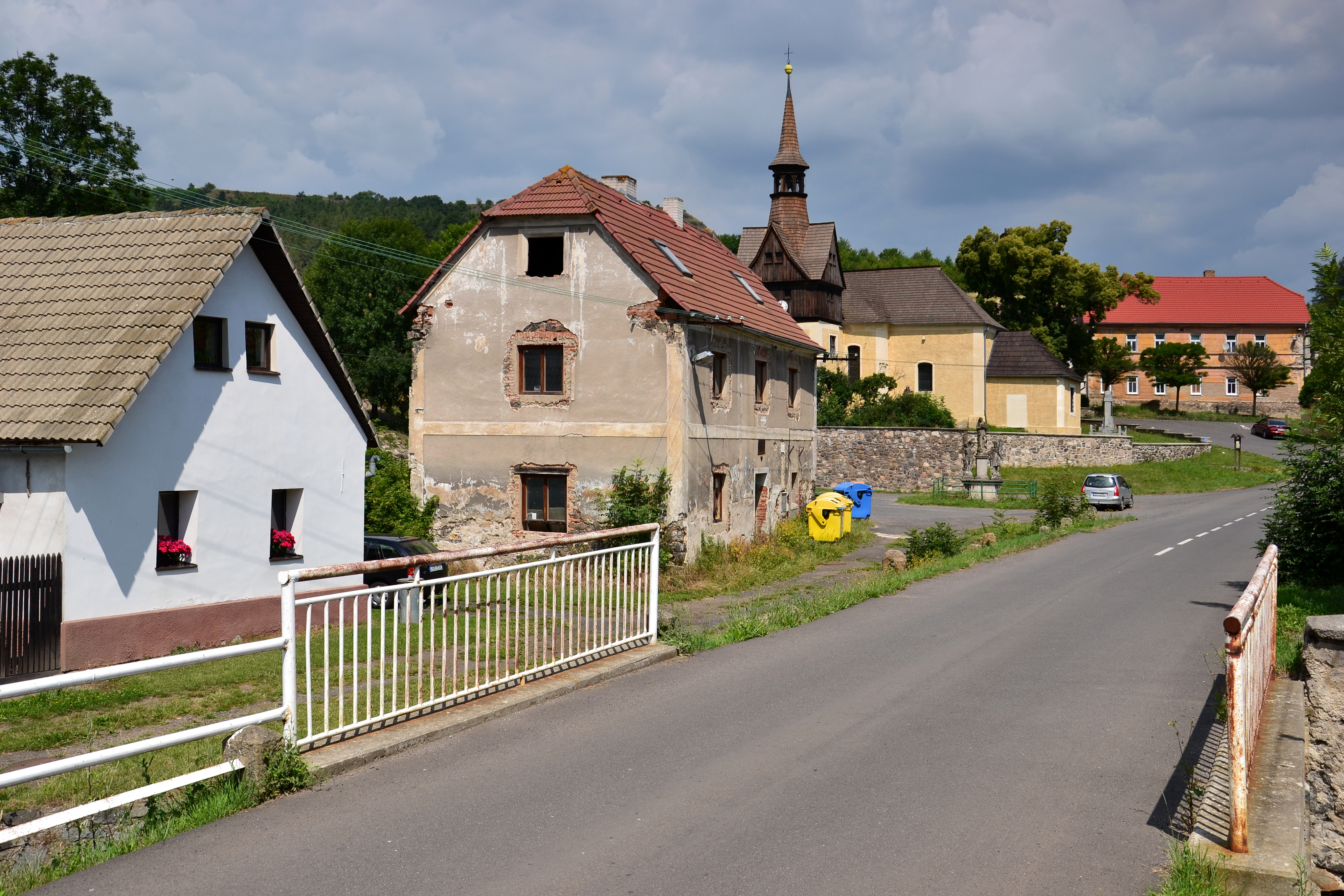 Úhošťany - střed vesnice